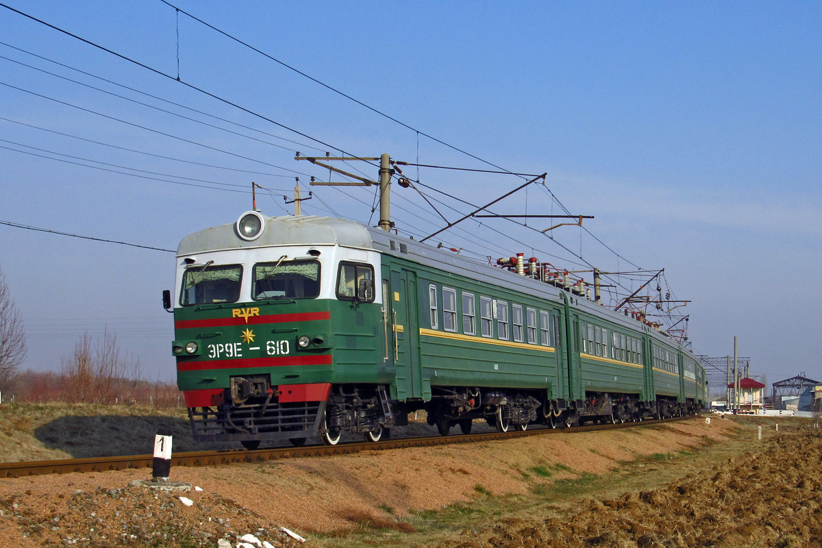 Построен в июле 1984 года в десятивагонной составности С завода поступил в эксплуатацию в ТЧ Минск-Северный Белорусской ж. д. В 1991 году был передан в ТЧ Узбекистан Среднеазиатской ж.д.. (По данным сайта "Российские электропоезда")